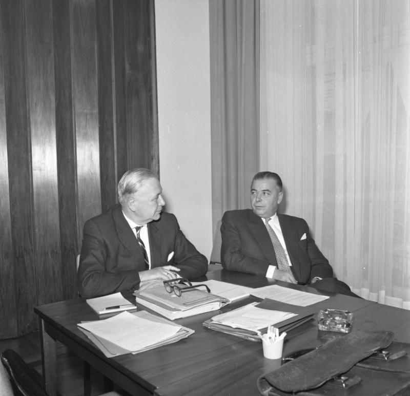 Konferenz der Ministerpräsidenten der Länder Haus der Landesvertretung v. Baden-Württemberg